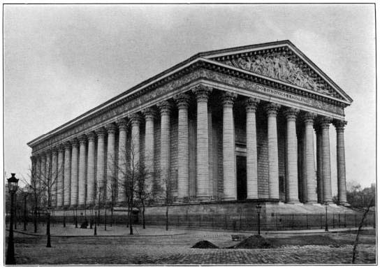 Ilustraciones libro de Memorias Saint-Saëns, 1919